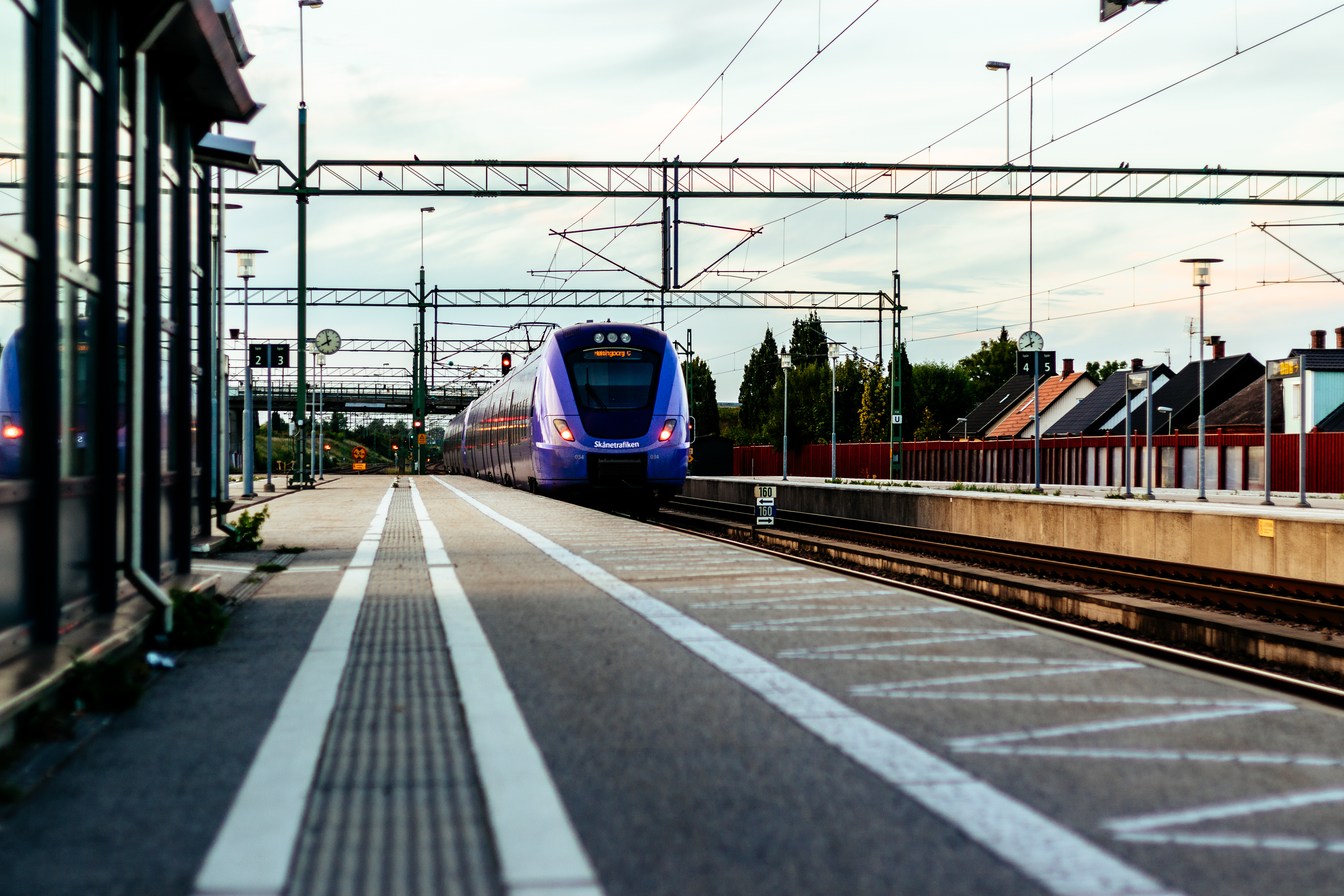 Kävlinge tågstation